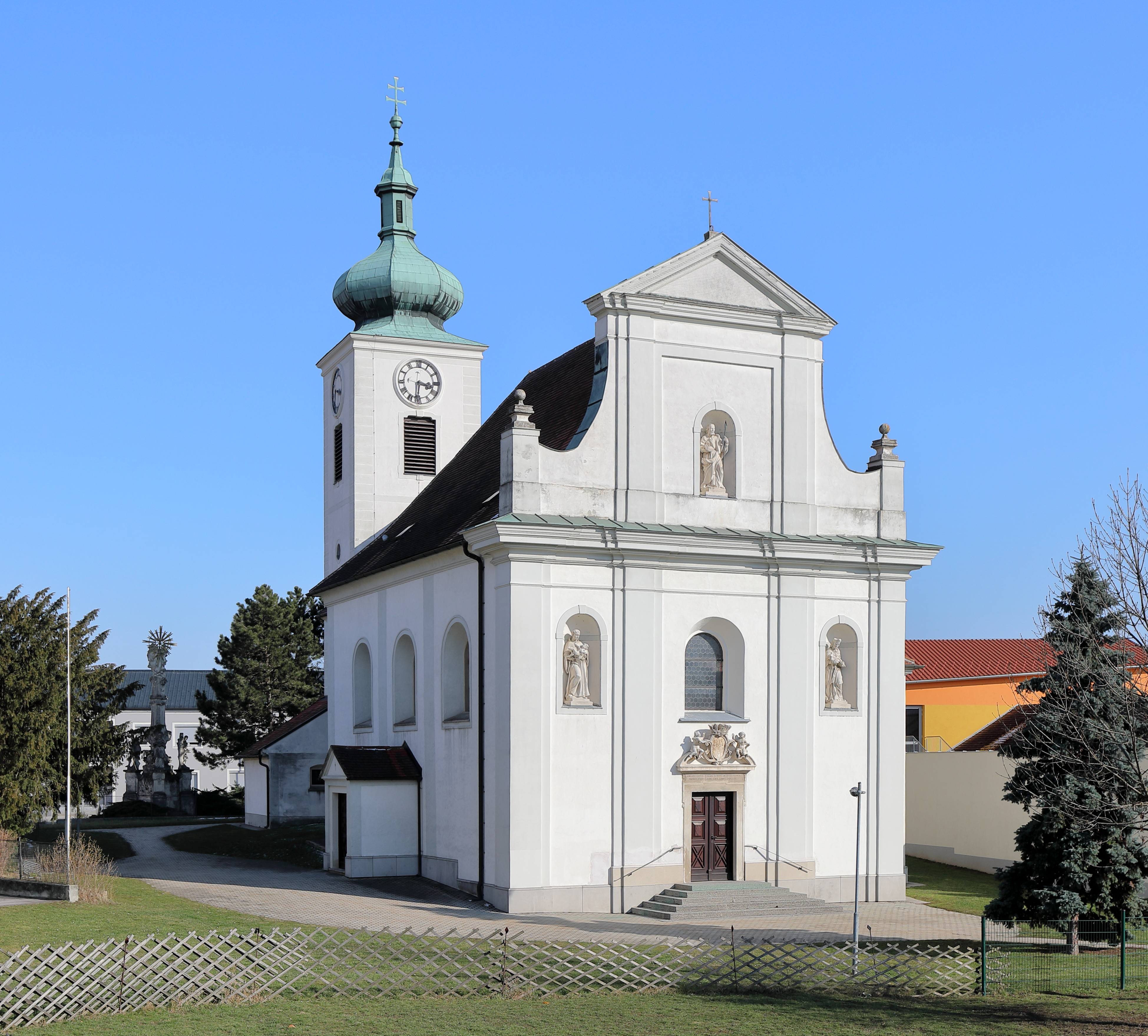 Nordwestansicht der röm.-kath. Pfarrkirche hl. Thomas in der niederösterreichischen Marktgemeinde Enzersdorf an der Fischa. Eine romanische Chorturmkirche mit einem barocken Langhaus, das 1714/15 errichtet wurde.